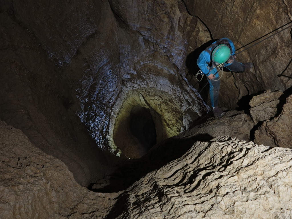 Discesa di un pozzo